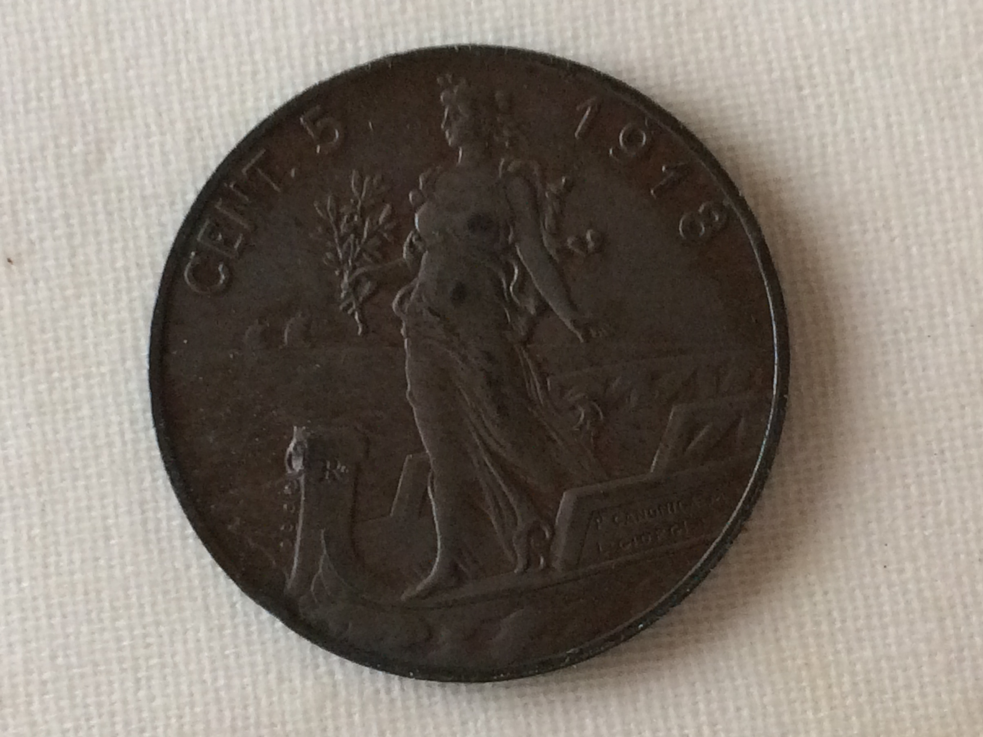 Rovescio di una moneta da 5 centesimi di lira della serie Donna su prora